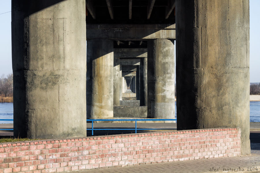 Мазыр. Мост цераз Прыпяць - самы доўгі аўтамабільны мост у Беларусі